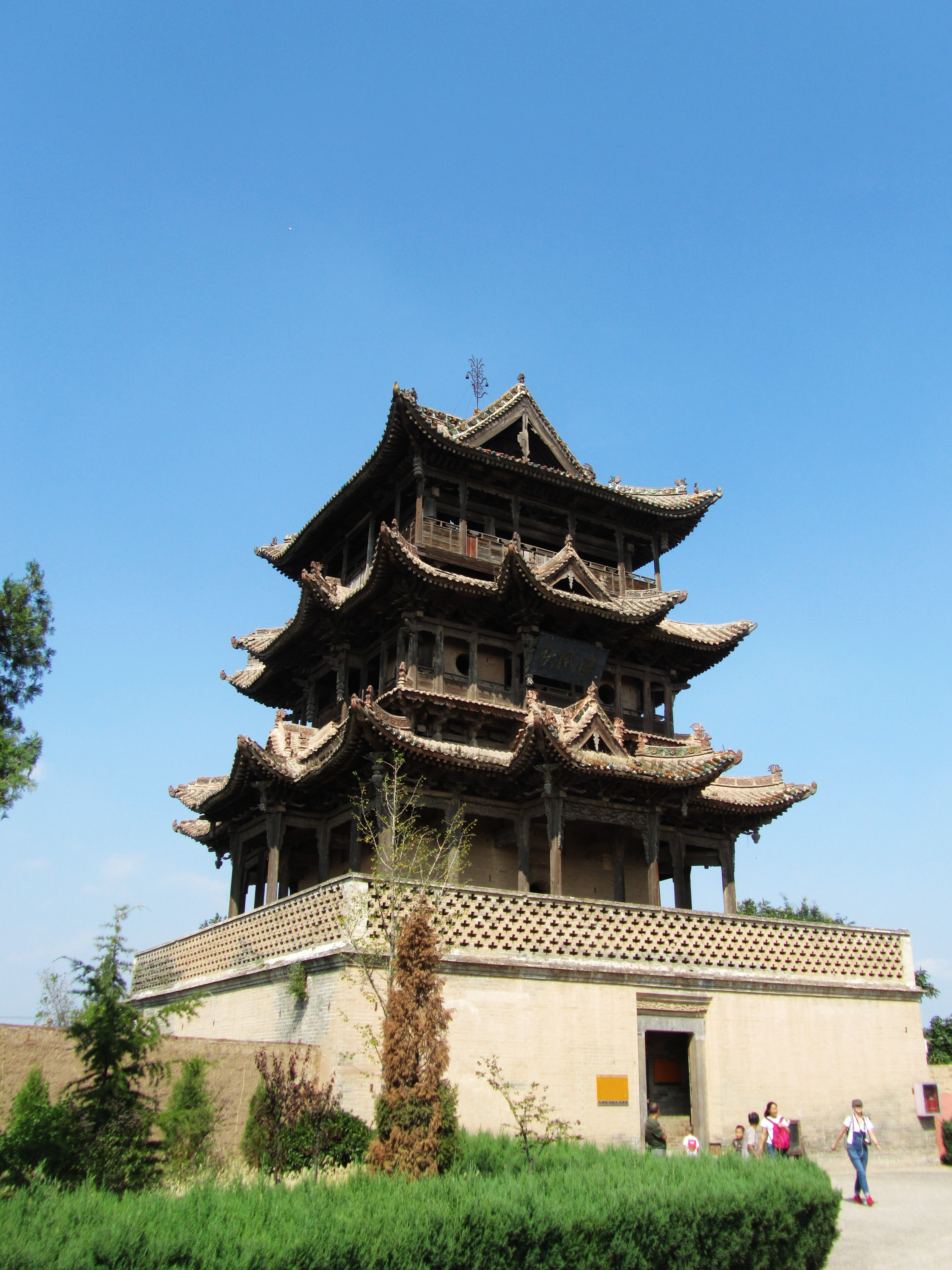 万荣后土祠秋风楼，侧面。